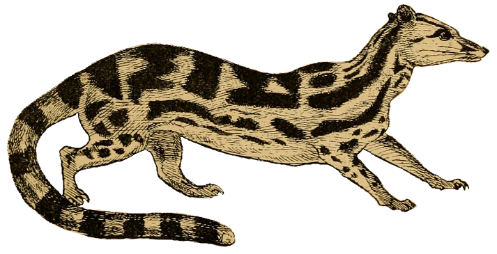 Prionodon maculosus